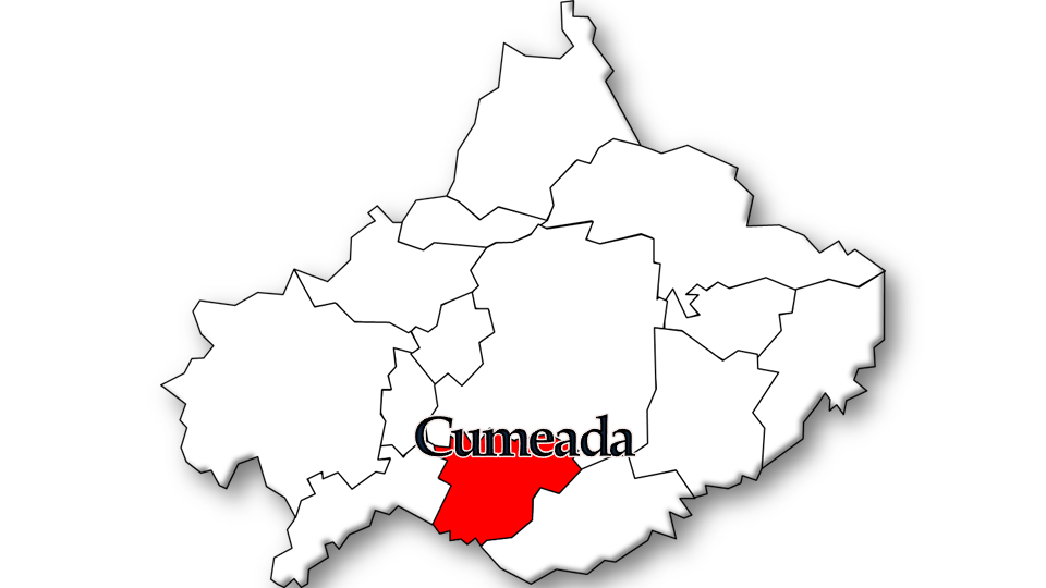 População